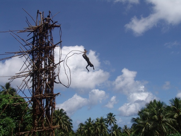 Ritual de Gkol de la Isla de Pnetecostés